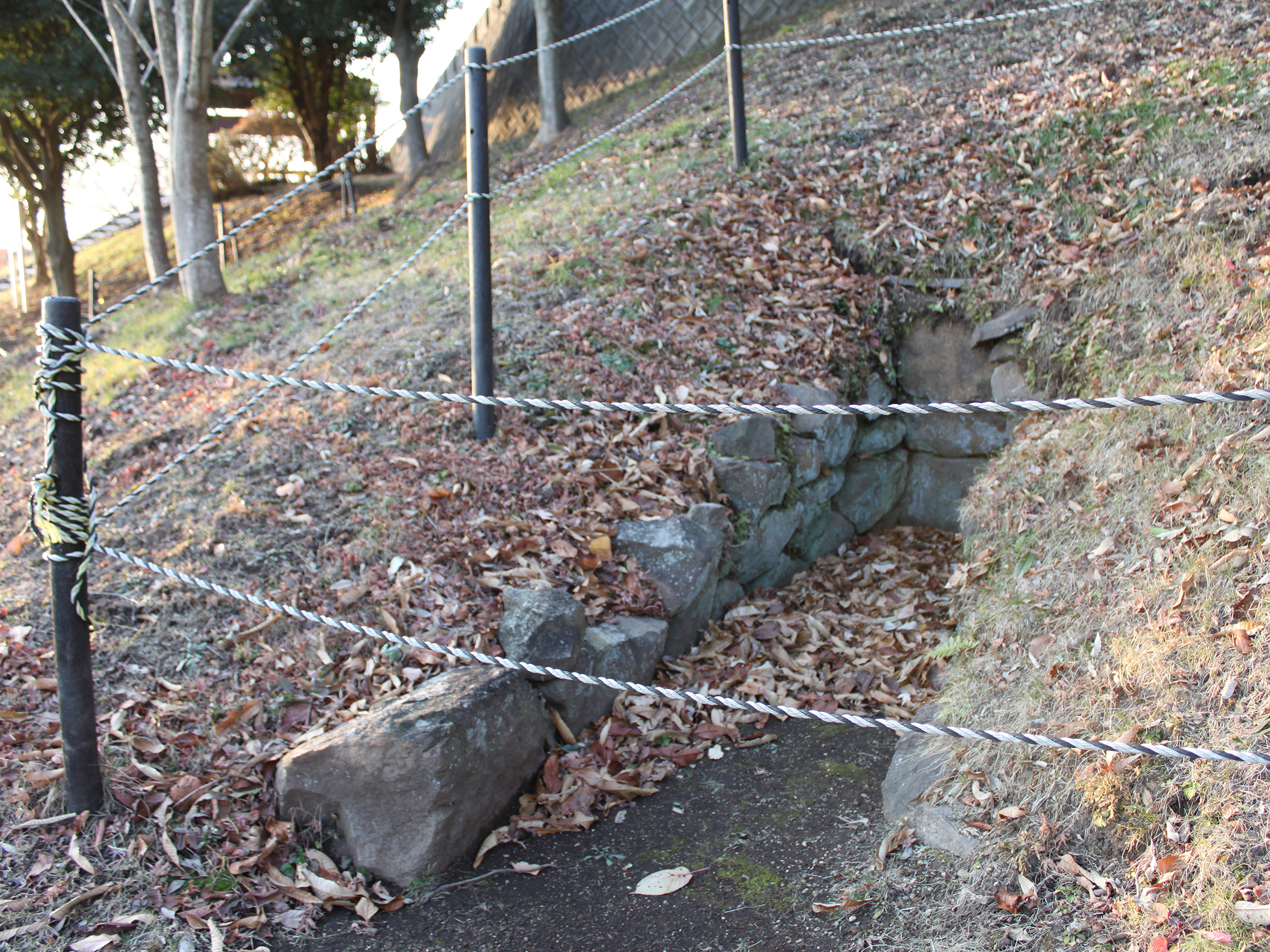 静岡県焼津市の笛吹段古墳群